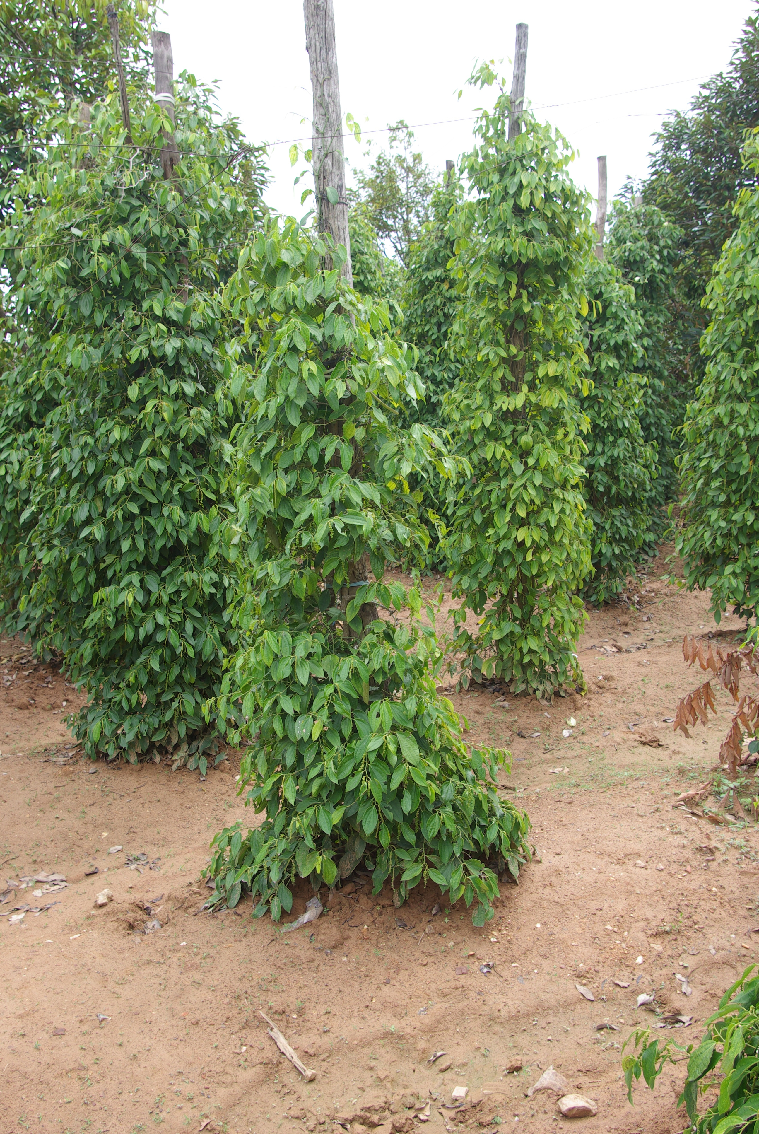 Culture du poivre à Kep au CambodgeUnknown culture of the pepper of kampot with kep, kampuchea